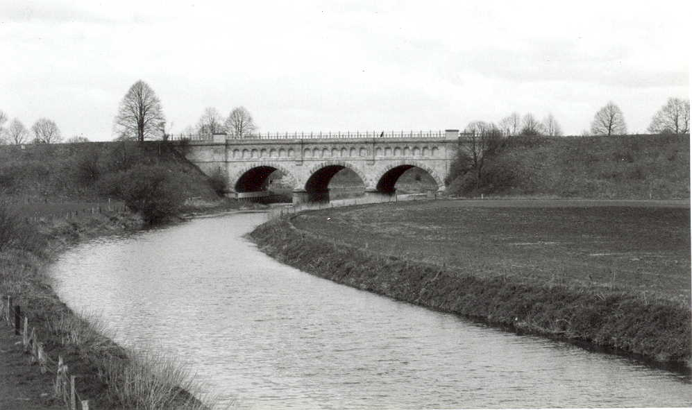 Die Steverbrücke des Dortmund-Ems-Kanal, eigenes Bild, GNU FDL